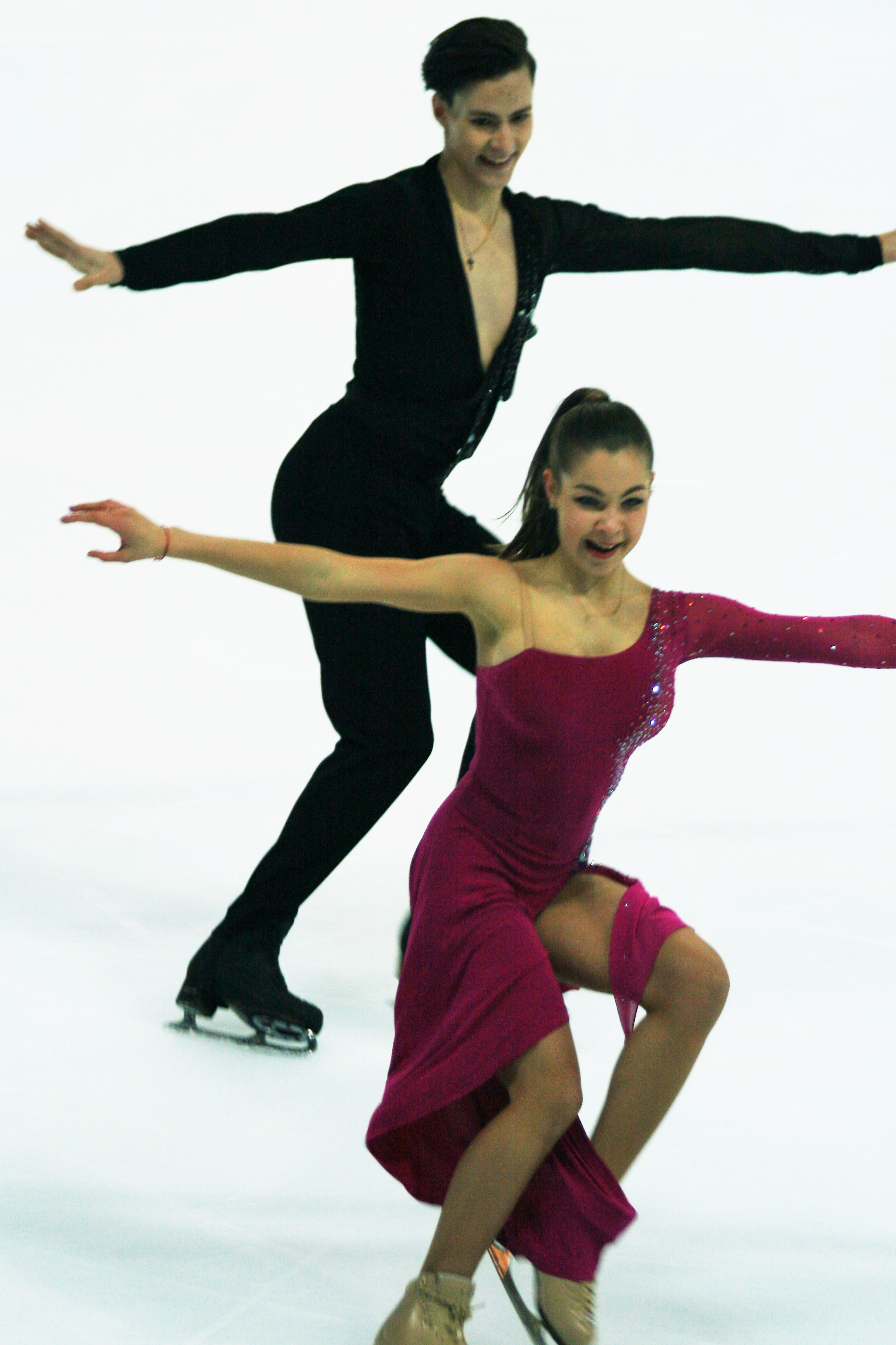 Анастасия Шпилевая / Григорий Смирнов (Россия) на финале Гран-при по фигурному катанию среди юниоров 2016-2017